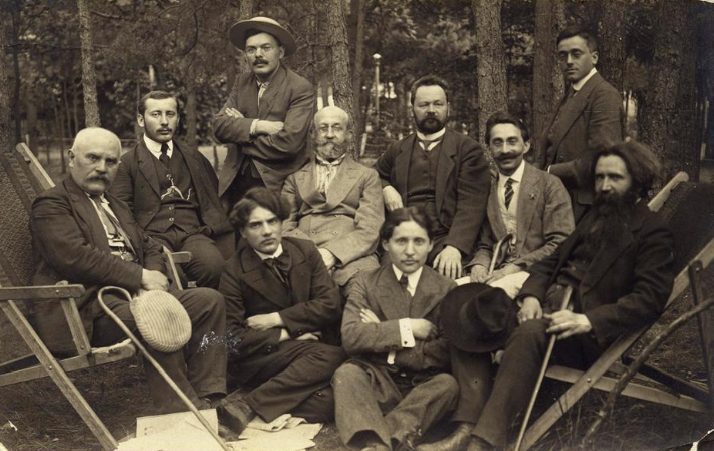 מערכת העיתון "דער מאמענט" 1920.ורשהדוד דרוק עומד מימין בשורה השניה.. Staff of Der moment, Warsaw, 1920s. (Back row, left to right) Mordkhe Spektor, A. Almi, Yoysef Tunkel, Moyshe Bunem Yustman, Tsevi Pryłucki, D. Druk, Sh. Janowski, Yisroel Khayim Zagorodski (front), Bentsion Chilinowicz, Yisroel Khayim Zagorodski, and Hillel Zeitlin. (YIVO)